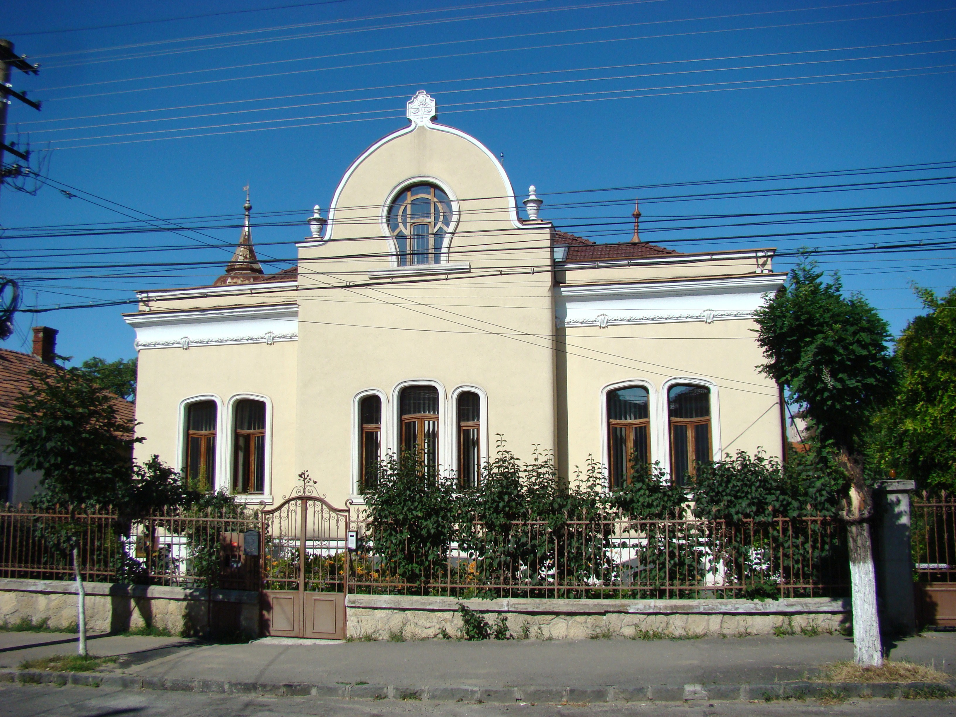 Clădire monument istoric, str.Andrei Mureșanu, nr. 15